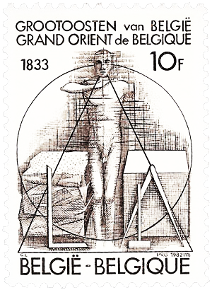 Timbre commémorant le 150e anniversaire du Grand Orient de Belgique (1833-1983). L'image montre l'apprenti maçon entre la pierre brute et de la pierre polie. L'apprenti doit marcher doit travailler sur la pierre brute, retirer sa rugosité et les imperfections jusqu'à atteindre la pierre polie, lisse et raffinée. Les instruments de travail présentés l'équerre, le compas et le maillet. La géométrie du cercle représente la vie et le triangle contient à son sommet la tête de l'homme, représentant le cheminement intellectuel.